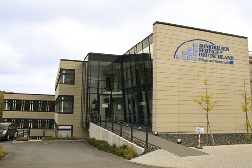 Zentralverwaltung Immobilien Service Deutschland